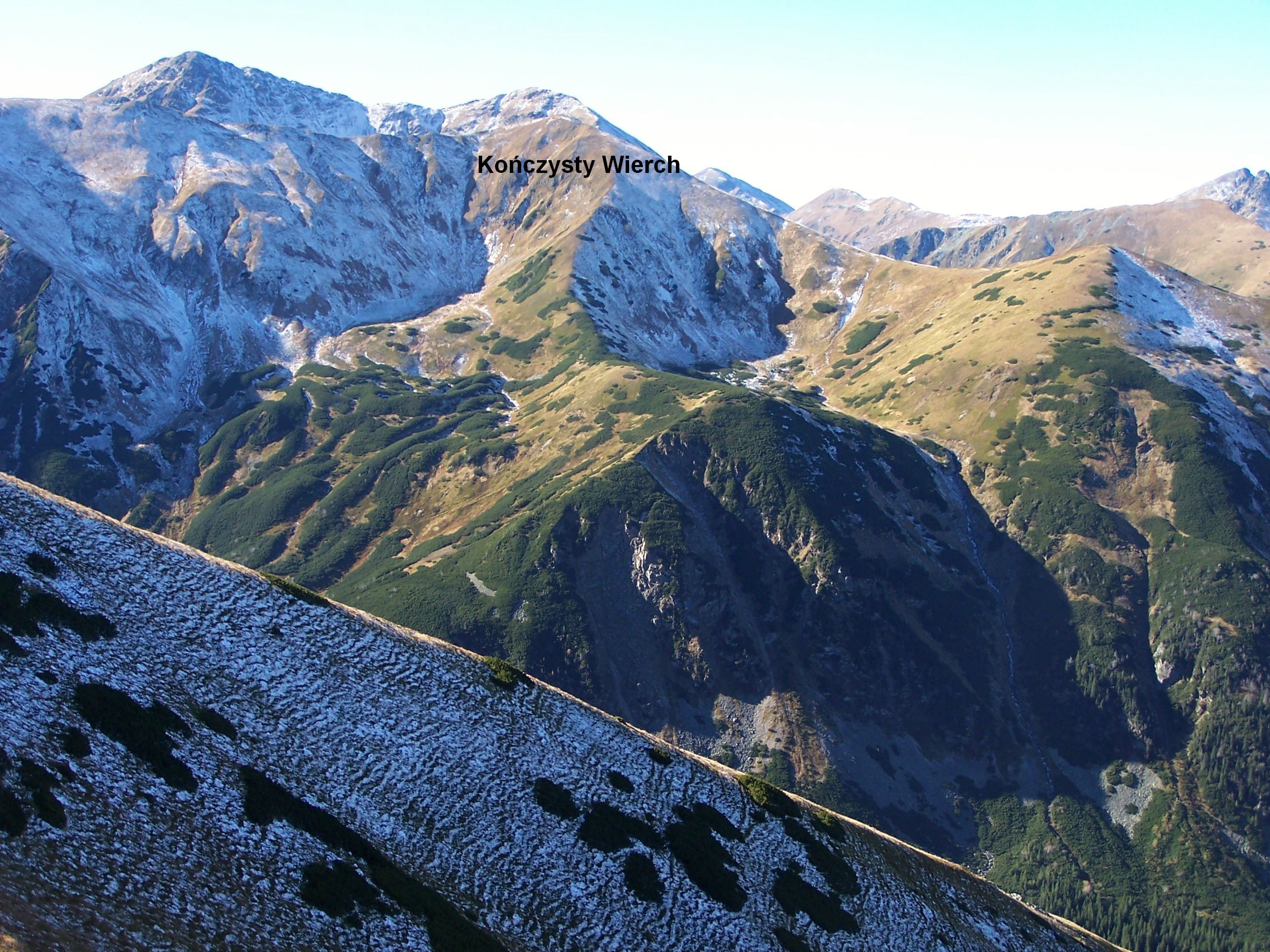 Dolina Kamienista (Tatry Zachodnie). Kończysty Wierch, Czubik, Dudowa Kotlina, Dudowe Turnie